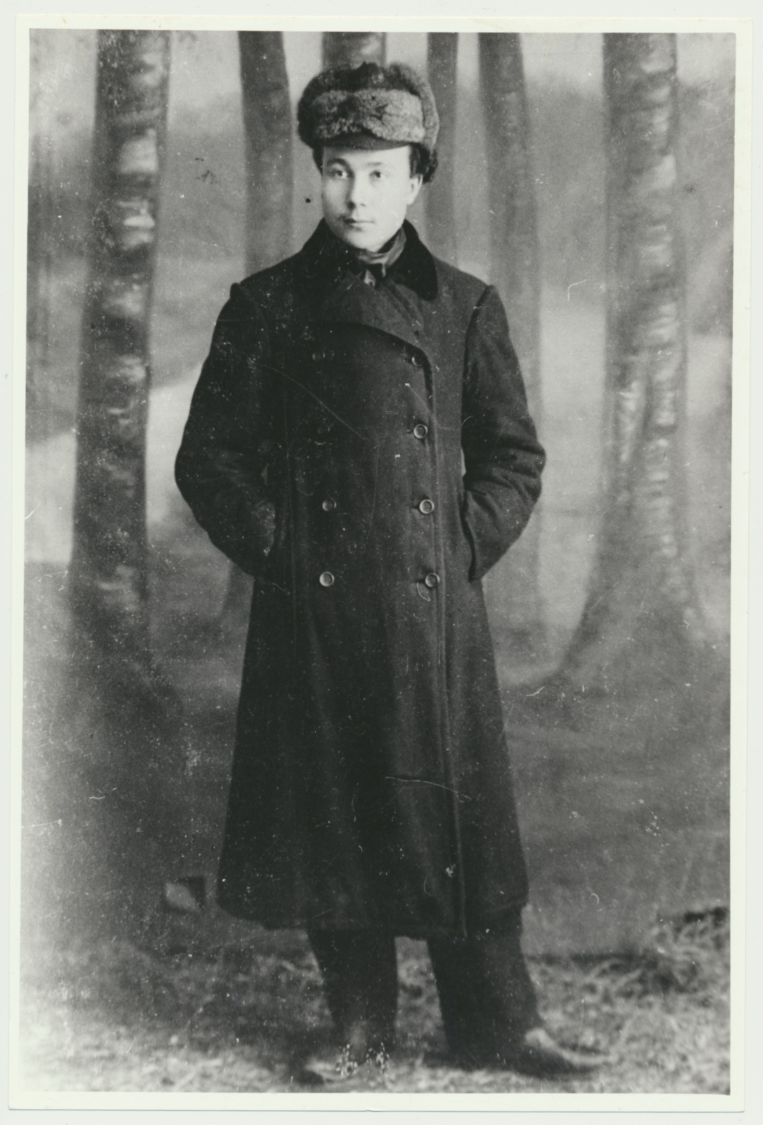 Anton Irv Viljandi kihelkonnakooli õpetajana